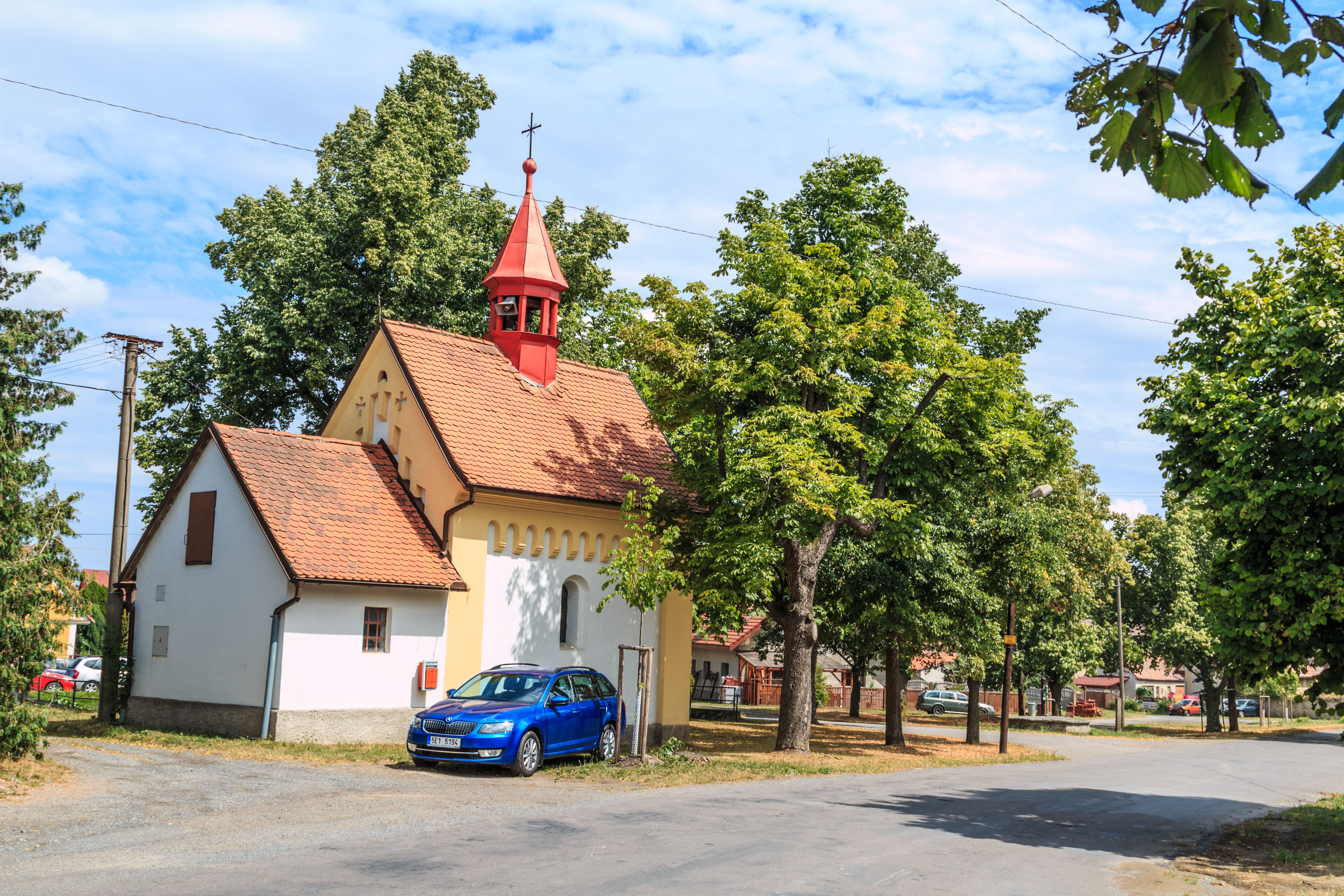 Skutíčko kaple